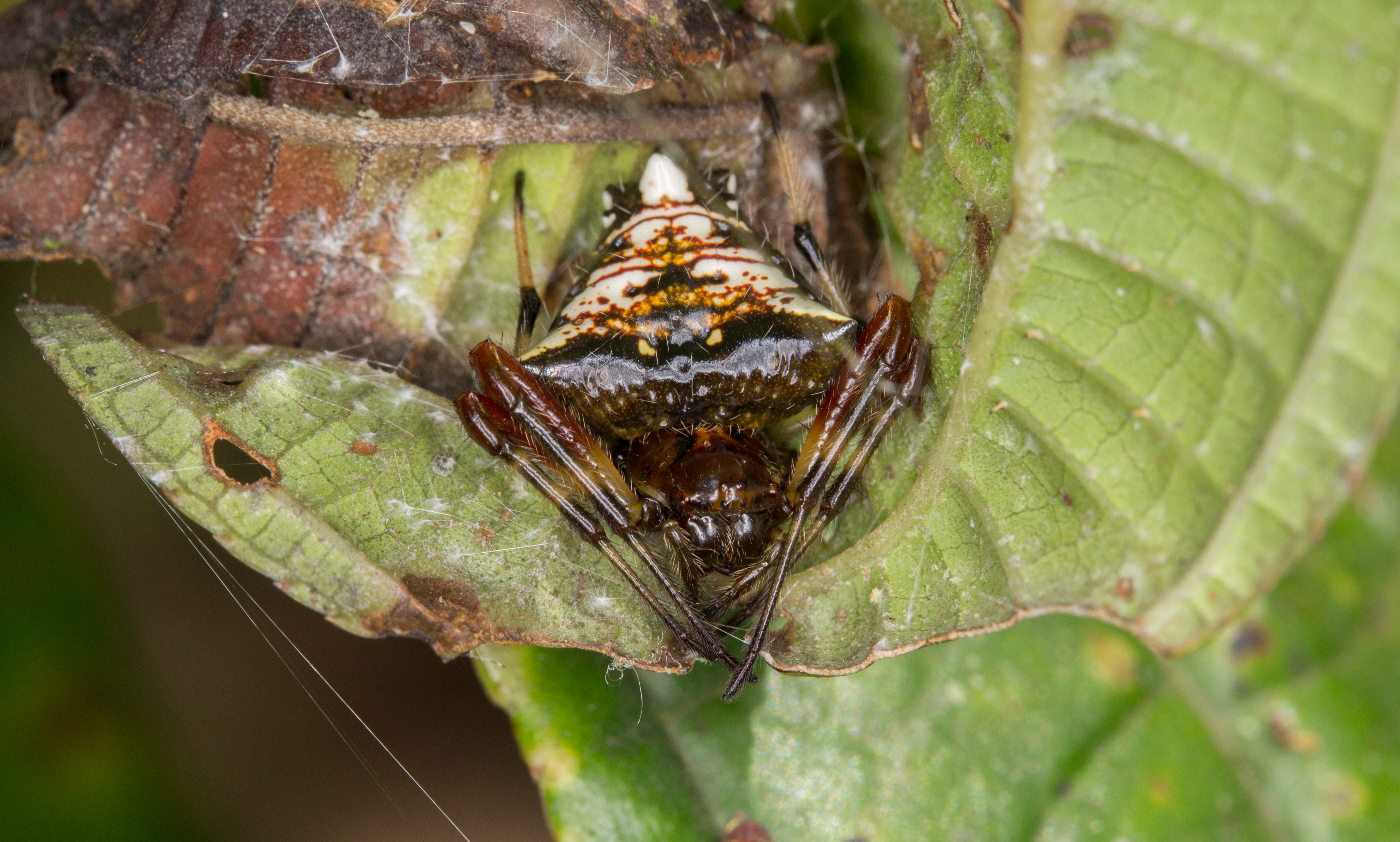 Triangle Orb Wearver spider